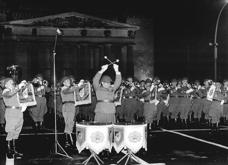 Berlin, 25. Jahrestag DDR-Gründung, Zapfenstreich ADN-ZB Demme 5.10.1974 Berlin: 25. Jahrestag-Ein großer Zapfenstreich der Nationalen Volksarmee fand am 5.10.1974 vor dem Mahnmal für die Opfer des Faschismus und Militarismus statt. Märsche und Kampflieder spielte ein Musikkorps der NVA.